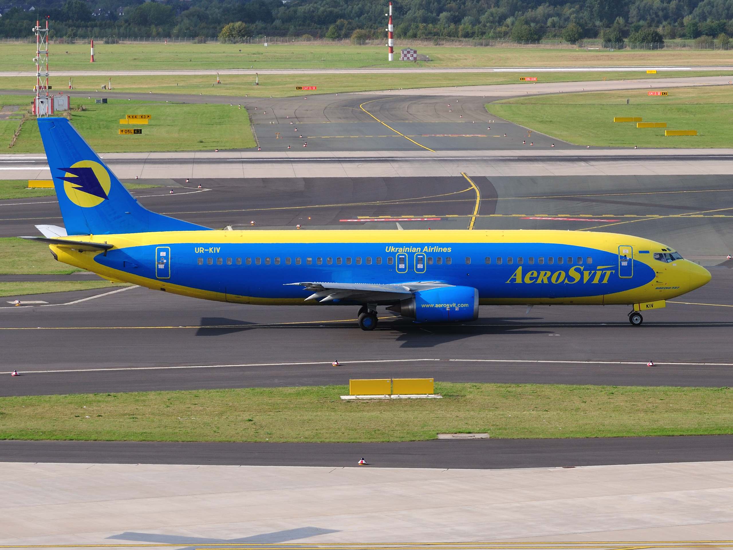 Aerosvit Airlines B737-400 UR-KIV